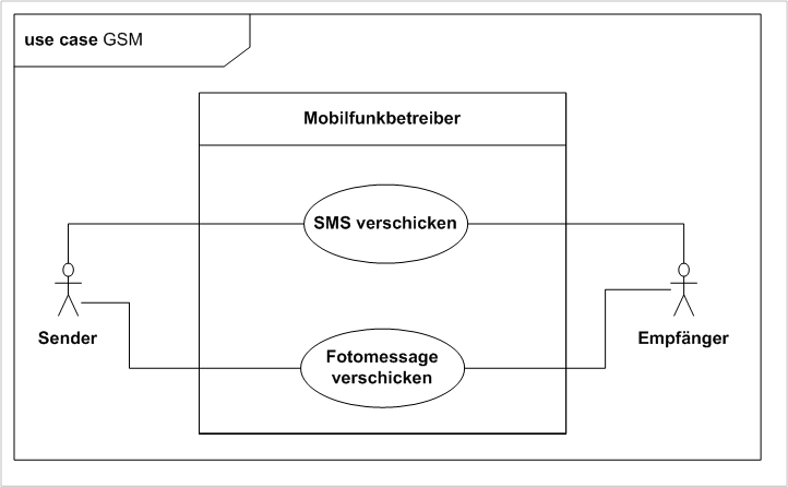 Anwendungsfalldiagramm (UML2) - Beispiel 1